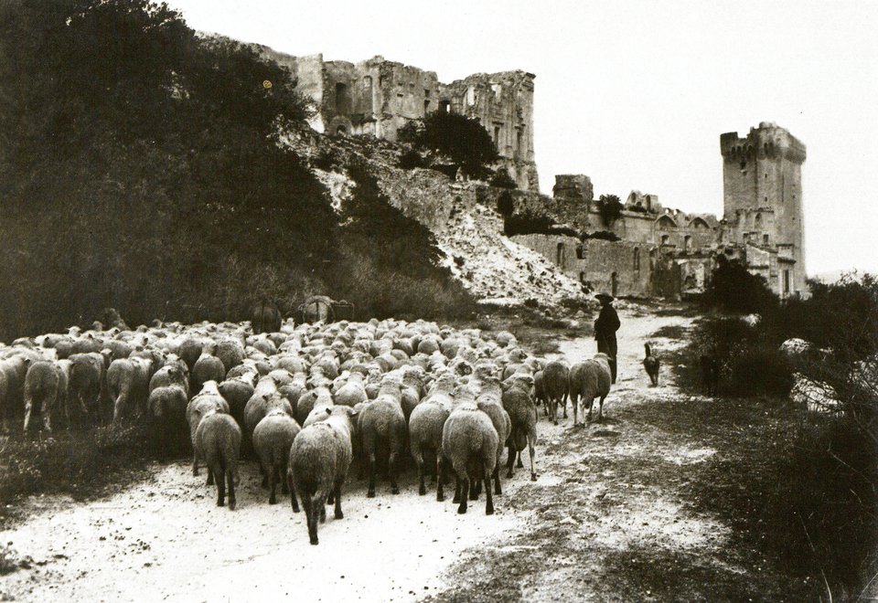 Montmajour, vue depuis le chemin d'accès, vers 1900